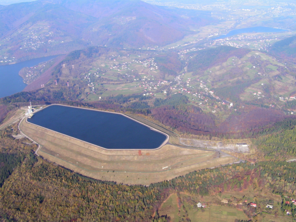 Zbiornik elektrowni szczytowo-pompowej na górze Żar widziany z kabiny szybowca